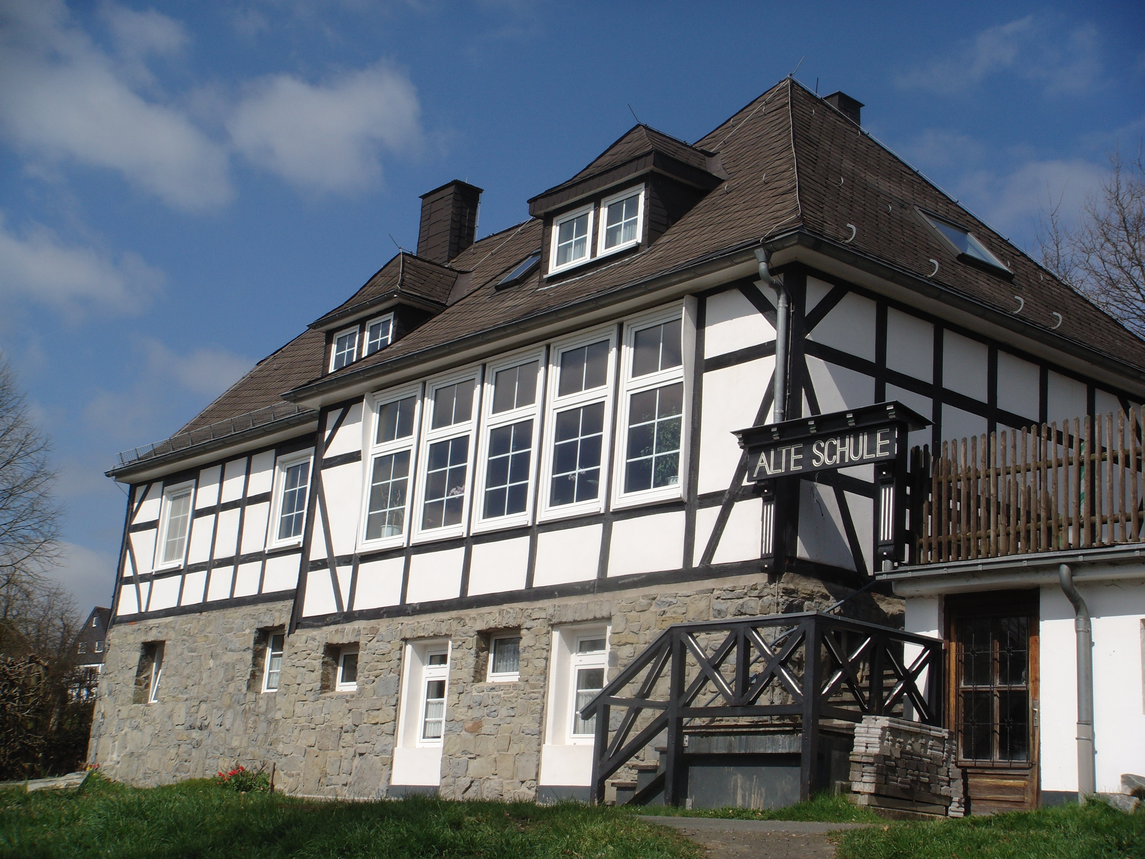 Ehemalige Schule Westernbödefeld